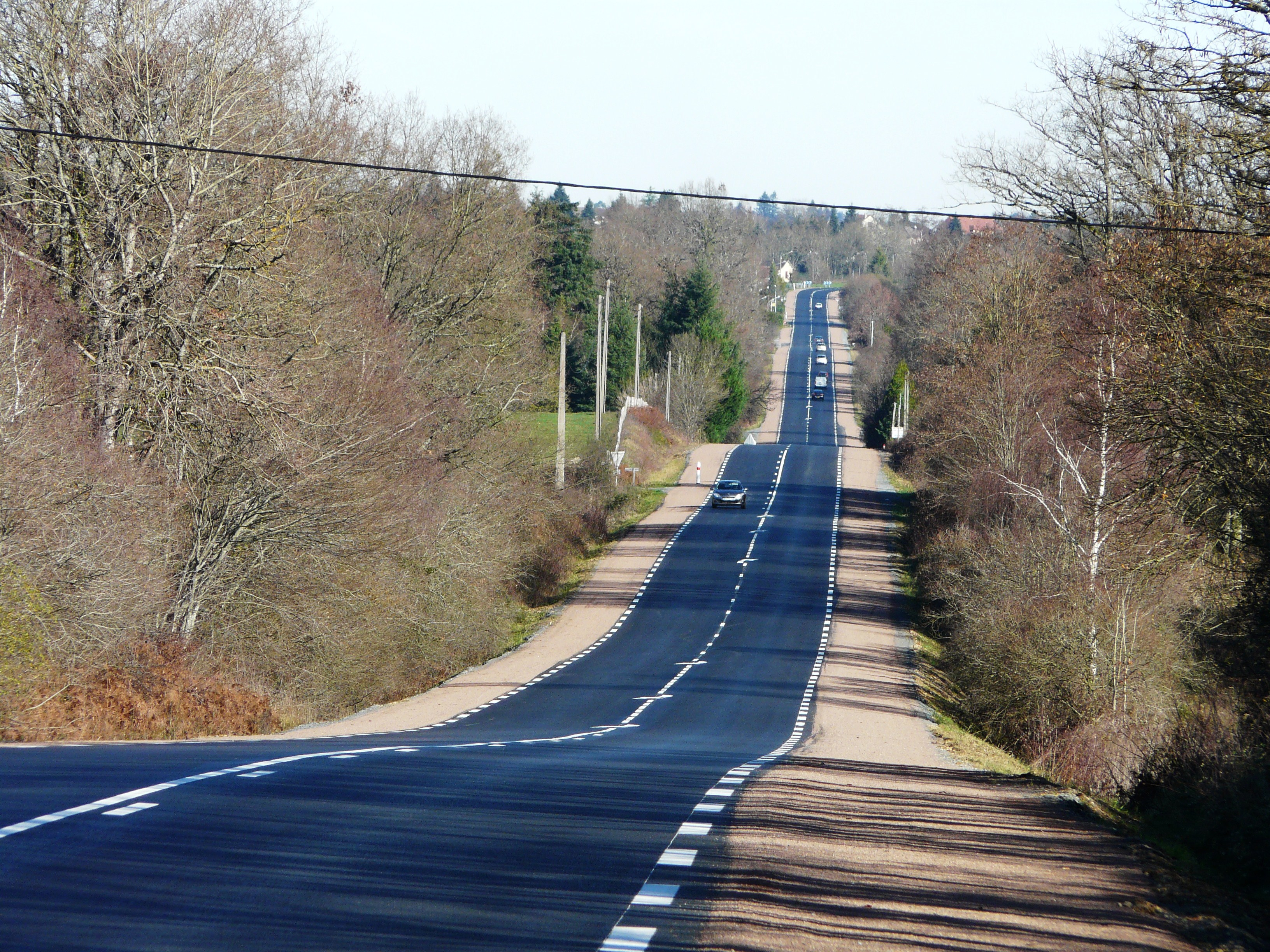 La route nationale 21 au nord de Mavaleix, Chalais, Dordogne, France. Vue prise en direction du nord-nord-est.